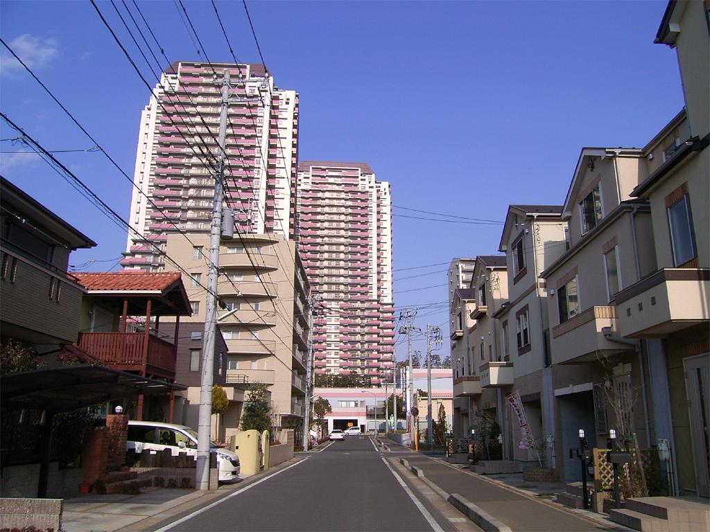 High rise apartment (Yukarigaoka)